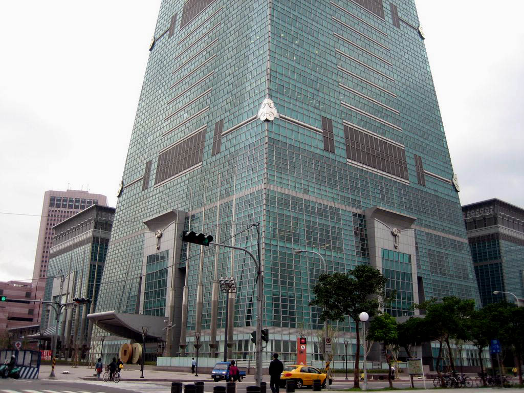 Taipei 101 basement